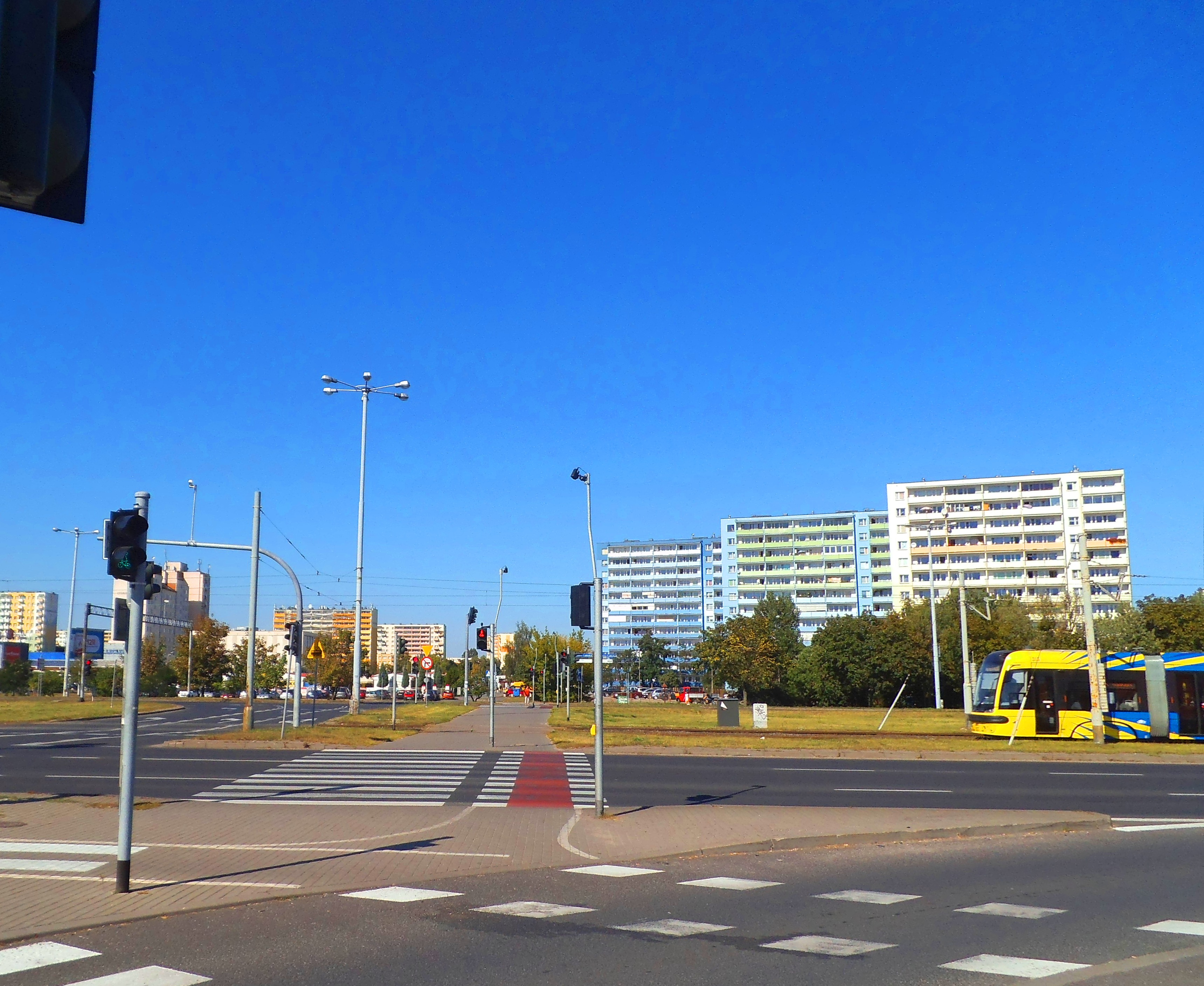 Ścieżka rowerowa biegnąca przecinająca ul. Szosa Lubicka w Toruniu